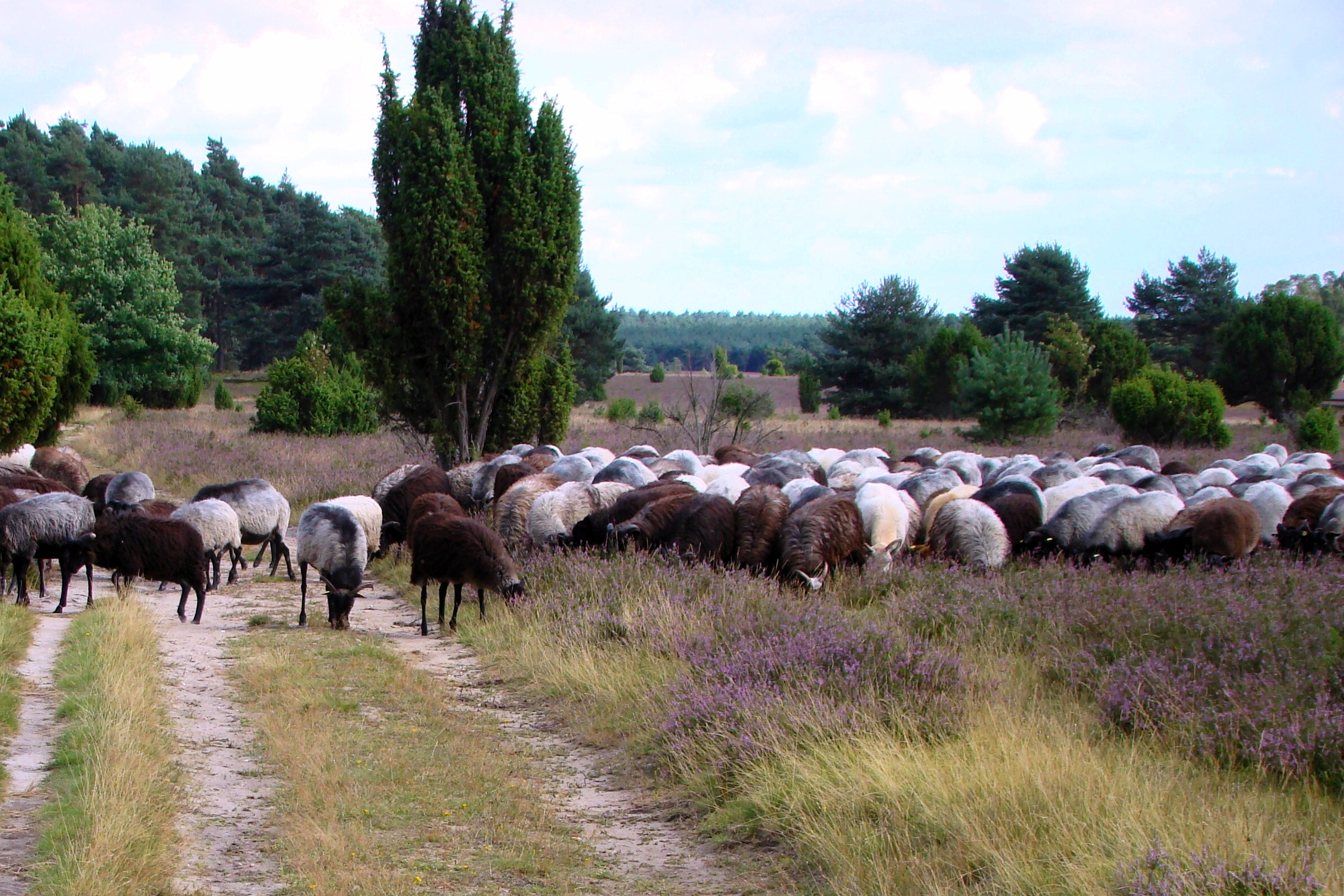 Heidschnucken in der Misselhorner Heide nahe Hermannsburg, Naturschutzgebiet „Heiden und Magerrasen in der Südheide“ ( NSG LÜ 334): im Landkreis Celle, Naturpark Südheide, Deutschland.